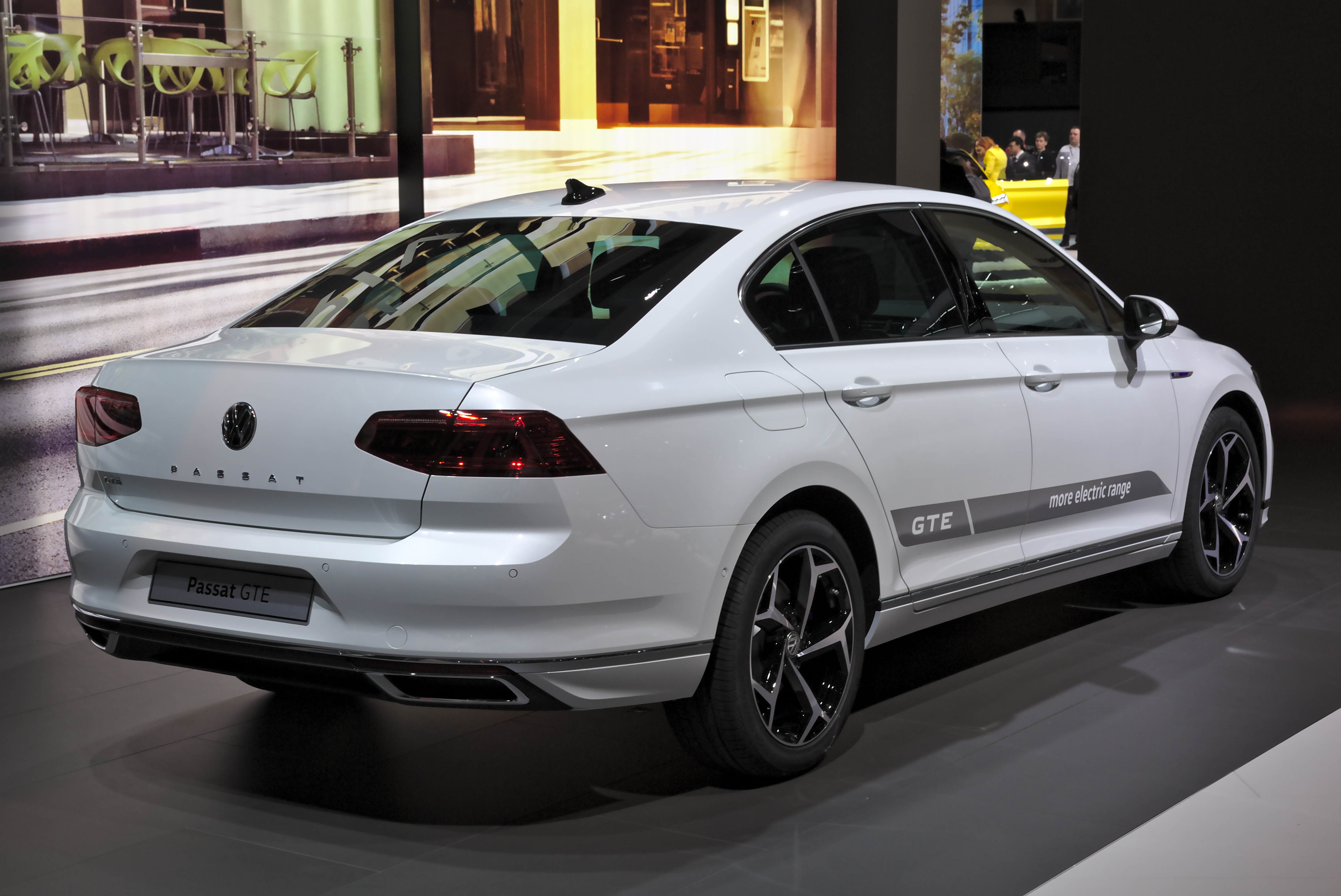 VW Passat GTE at Geneva Motor Show 2019